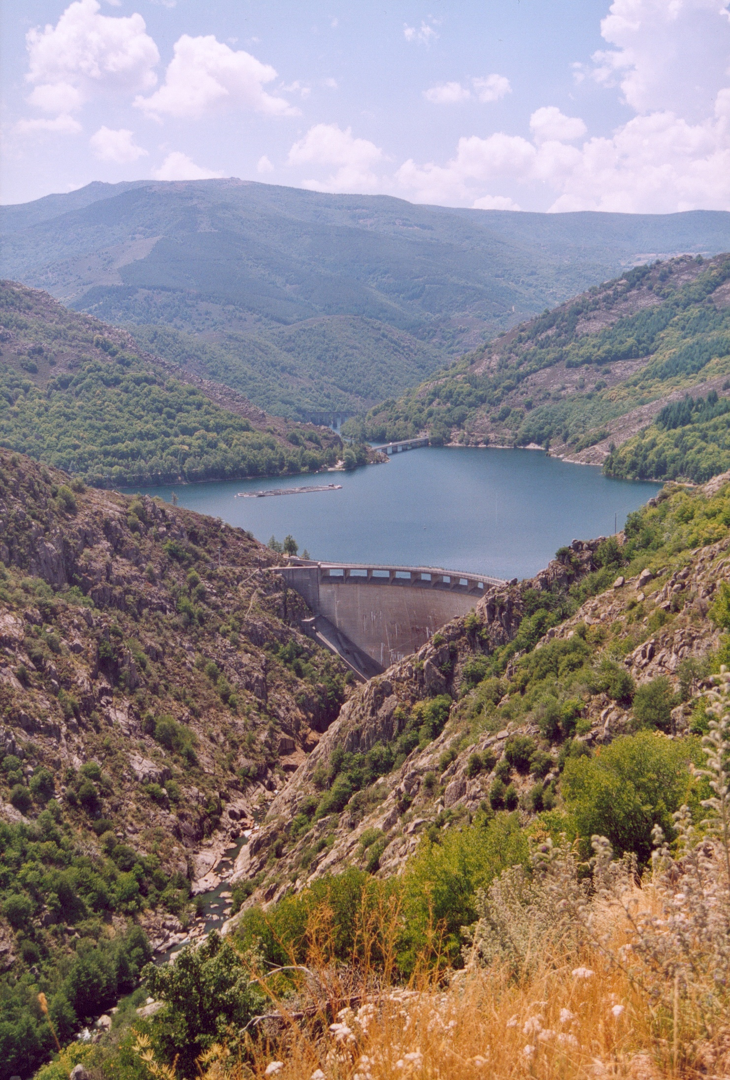 France Lozere Villefort Le barrage Photographie prise par GIRAUD Patrick Août 2005